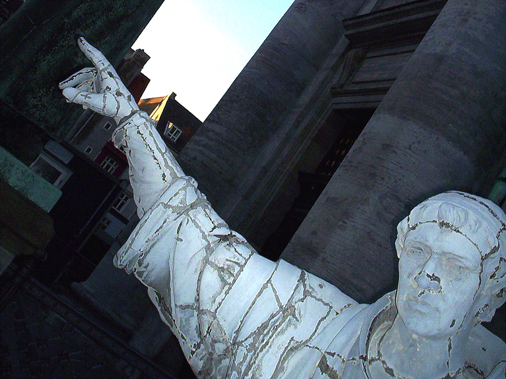 Bernhard af Clairvaux, Georg Christian Freund, 1883-84, Frederikskirken, København